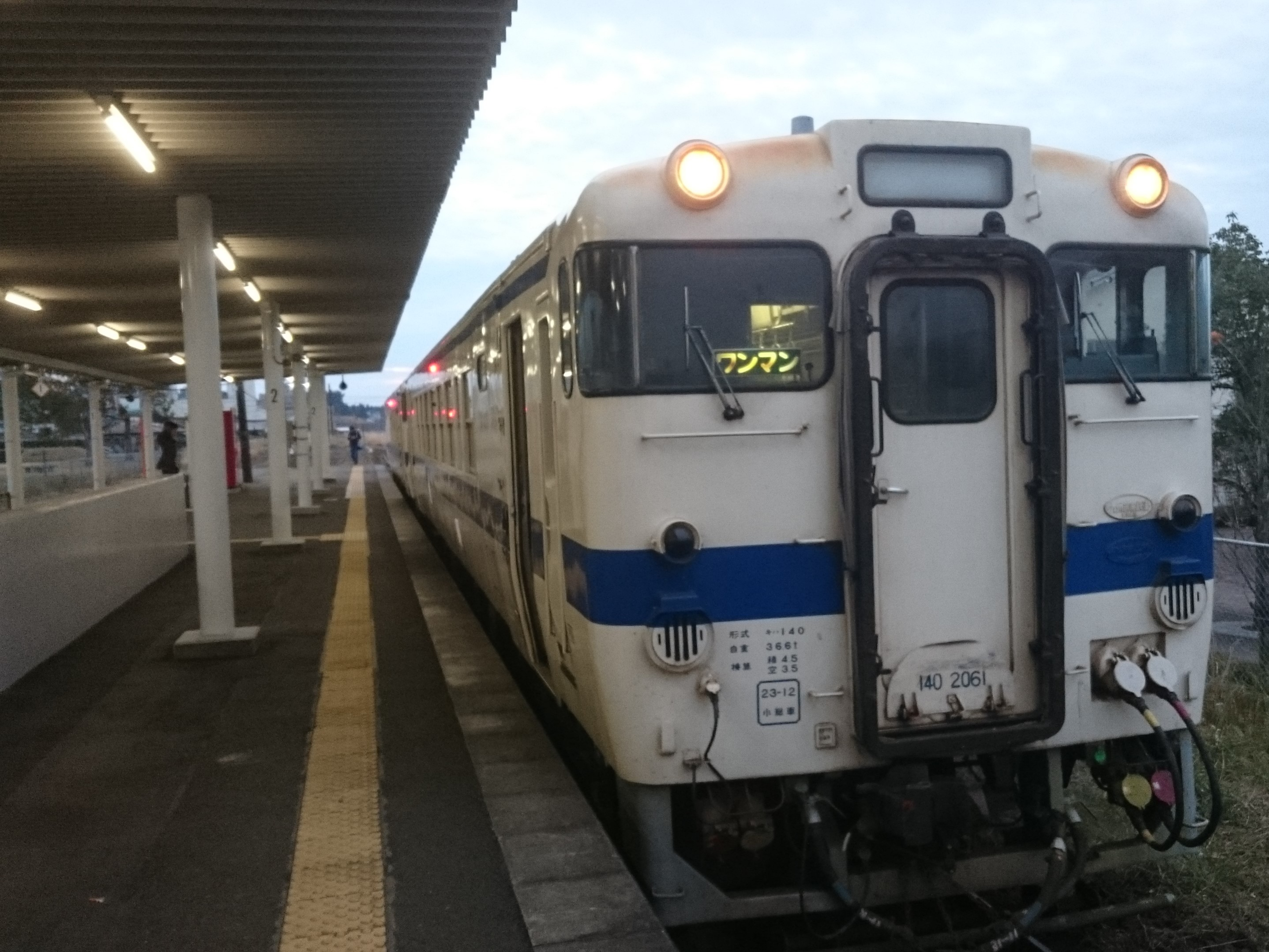 JR吉都線小林駅に停車中のキハ140形気動車